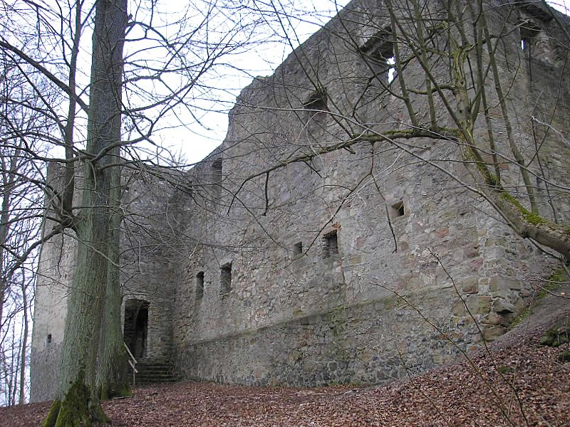 Burg Bramberg - Hauptbau